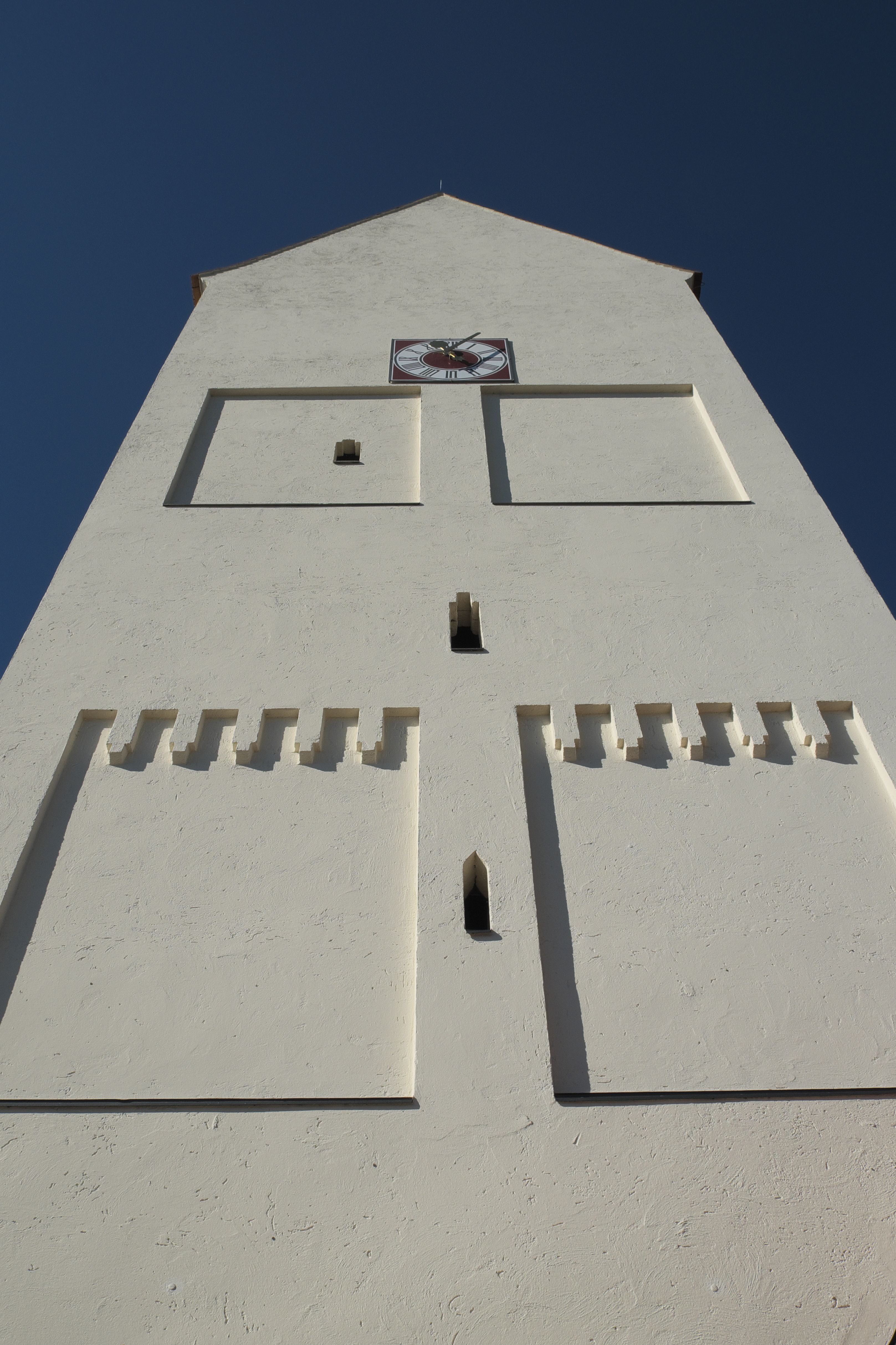 Katholische Filialkirche Mariä Himmelfahrt in Unterschweinbach (Egenhofen) im Landkreis Fürstenfeldbruck (Bayern/Deutschland)